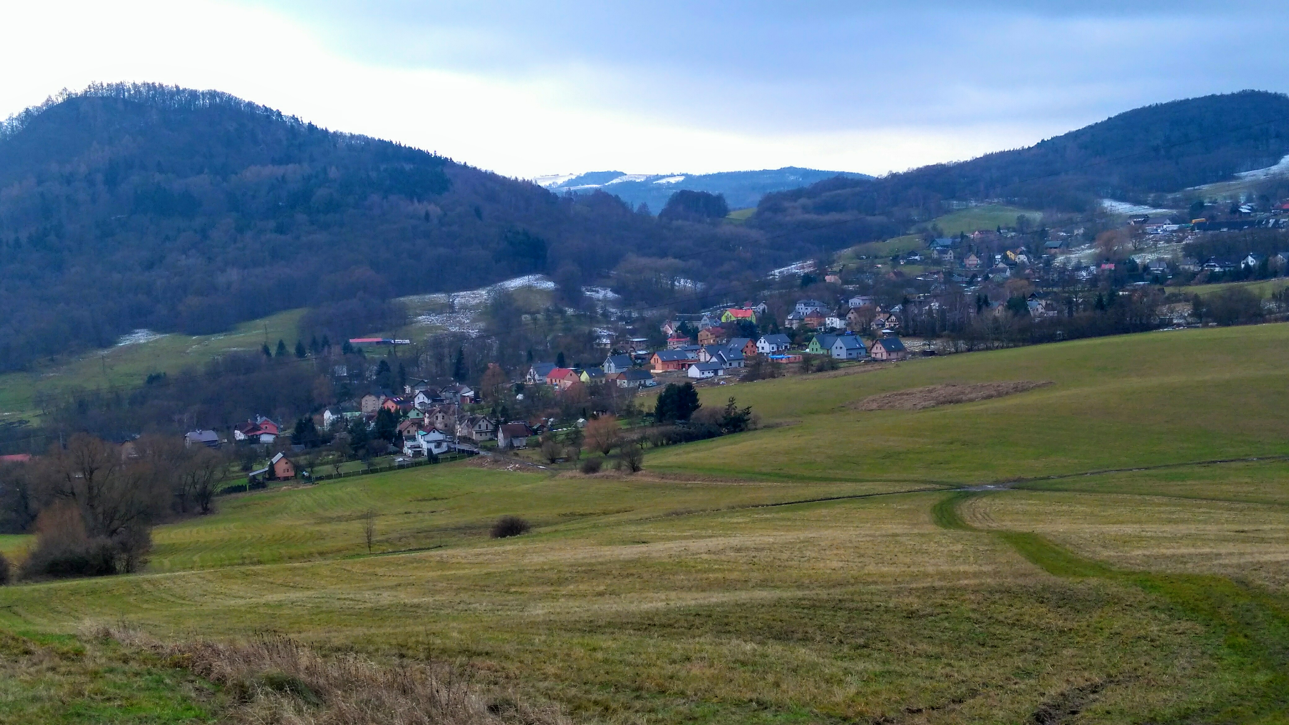 Obec a hora.